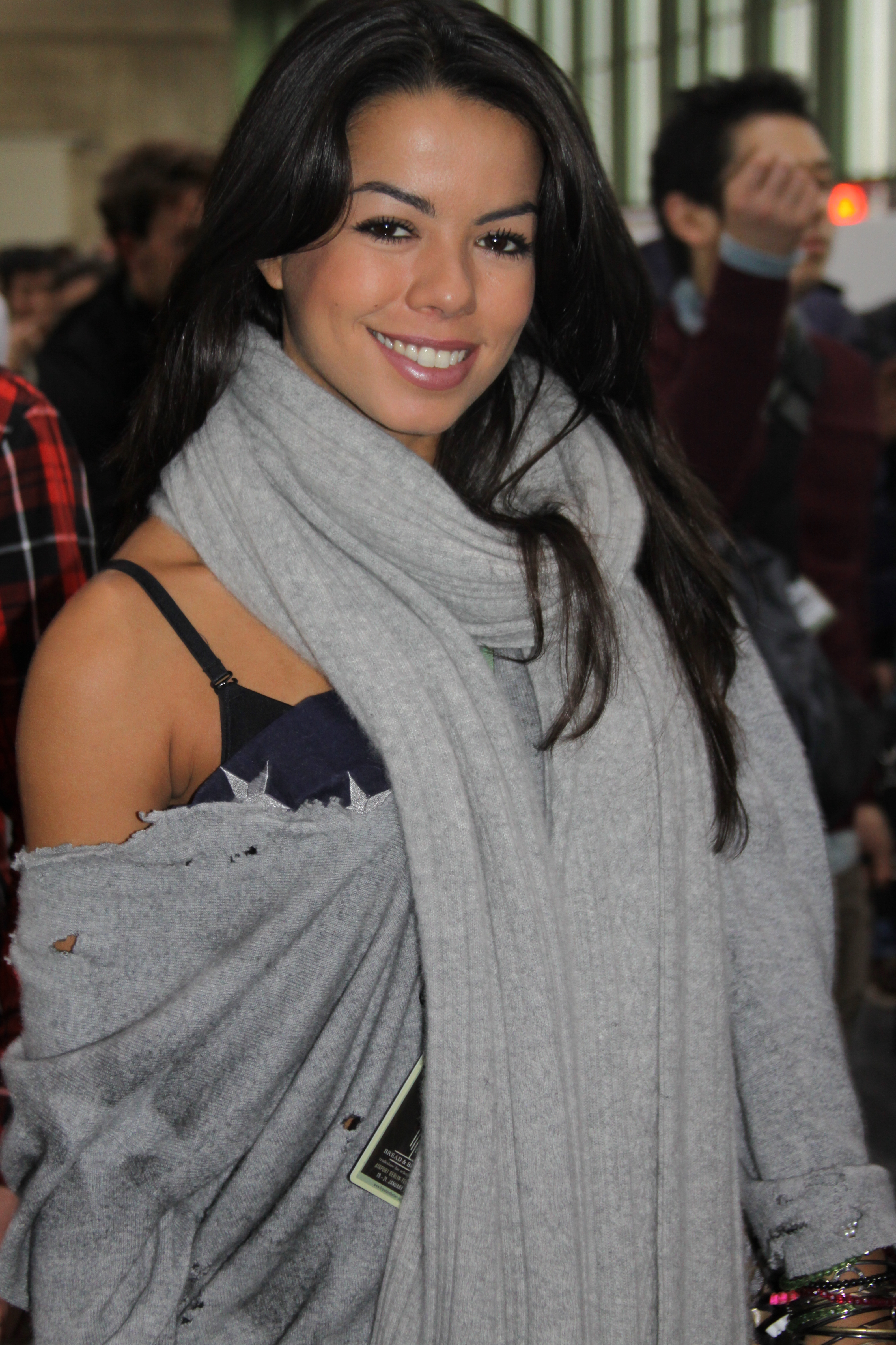 Fernanda Brandao auf der Bread & Butter Messe in Berlin am 19.1.2011